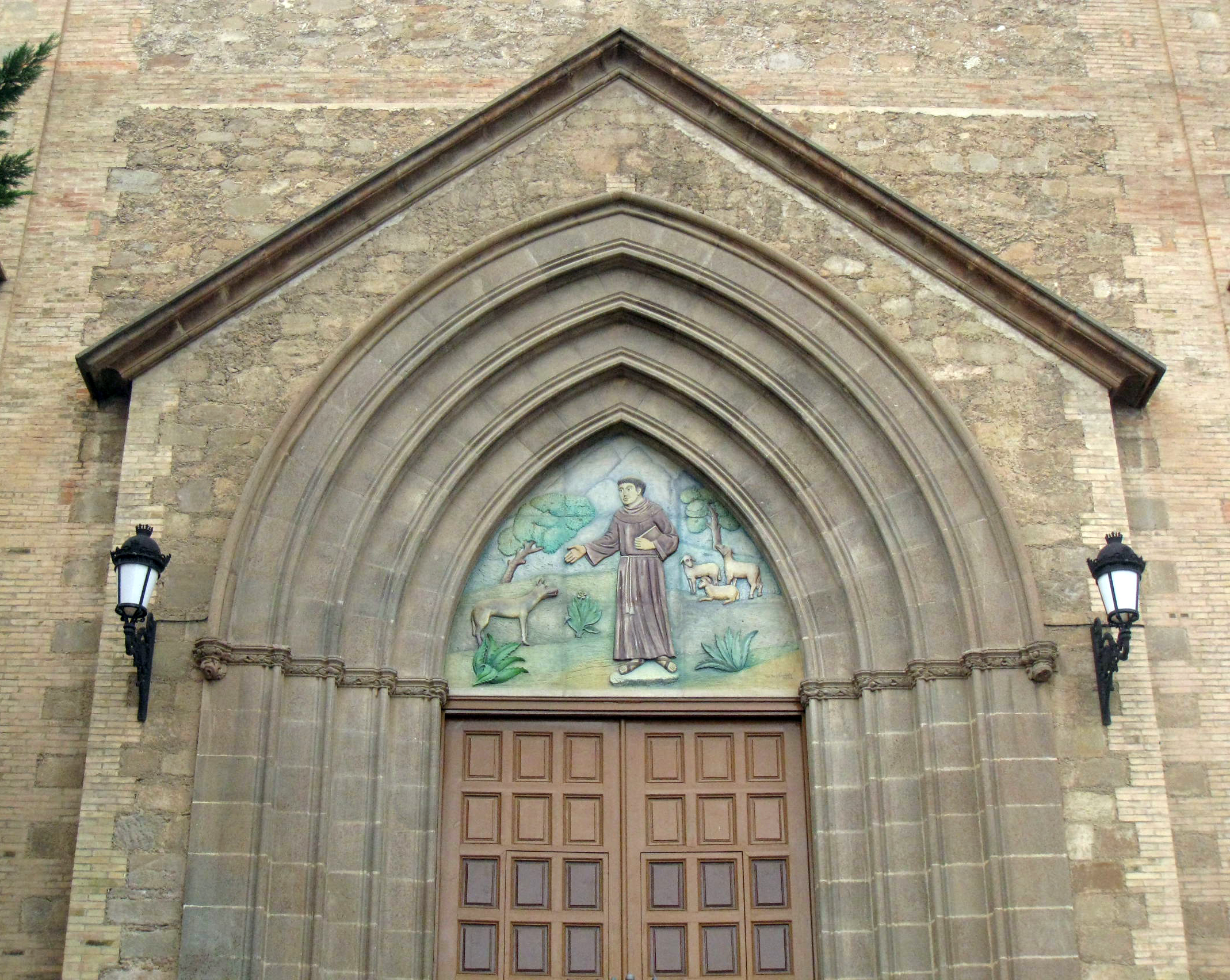 Església i convent de Sant Francesc (Berga) Object location42° 06′ 12.05″ N, 1° 50′ 38.5″ E